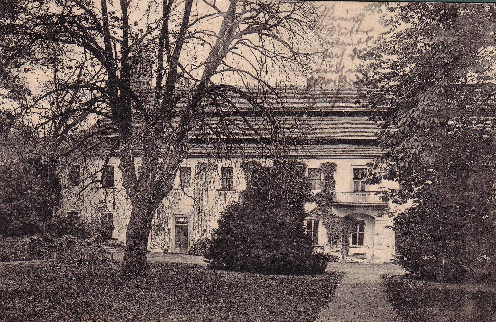 Ansicht Herrenhaus in Althaldensleben, Gartenseite